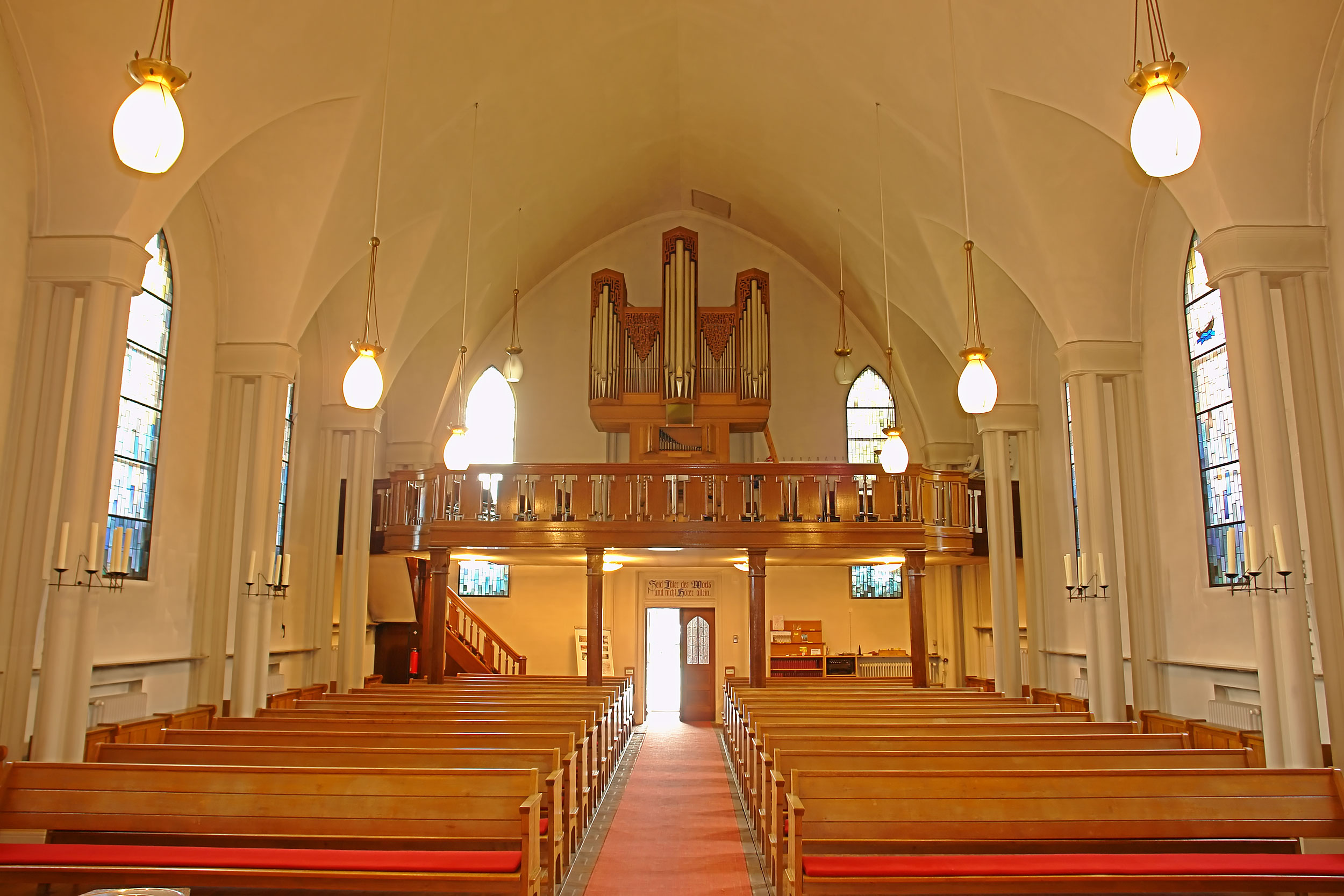 Alt Hastedter Kirche in Bremen, Bennigsenstraße 7Das abgebildete Objekt ist ein geschütztes Kulturdenkmal in der Freien Hansestadt Bremen, mit der Nr. 0121 beim Landesamt für Denkmalpflege registriert.